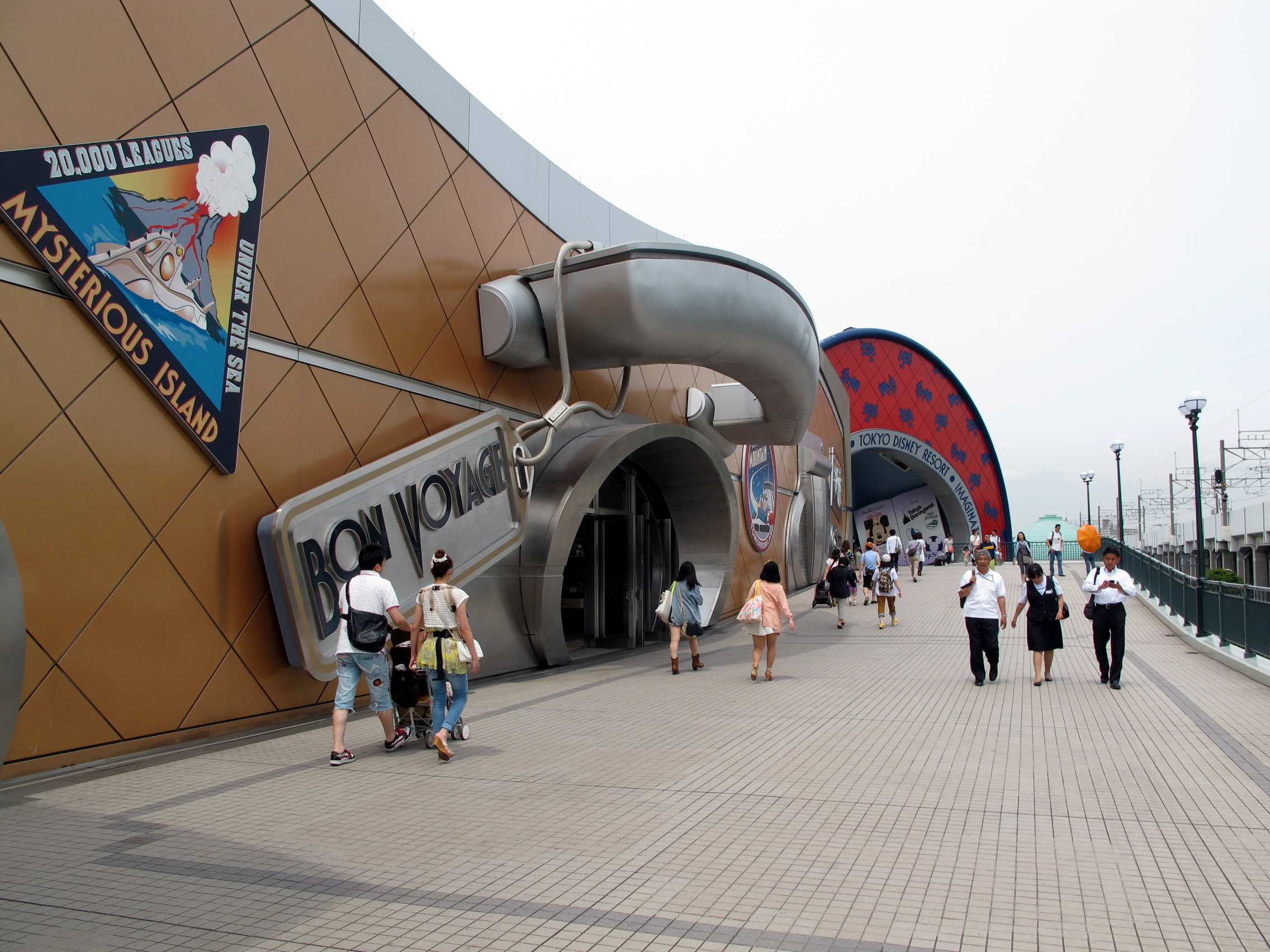 Bon Voyage, Tokyo Disneyland